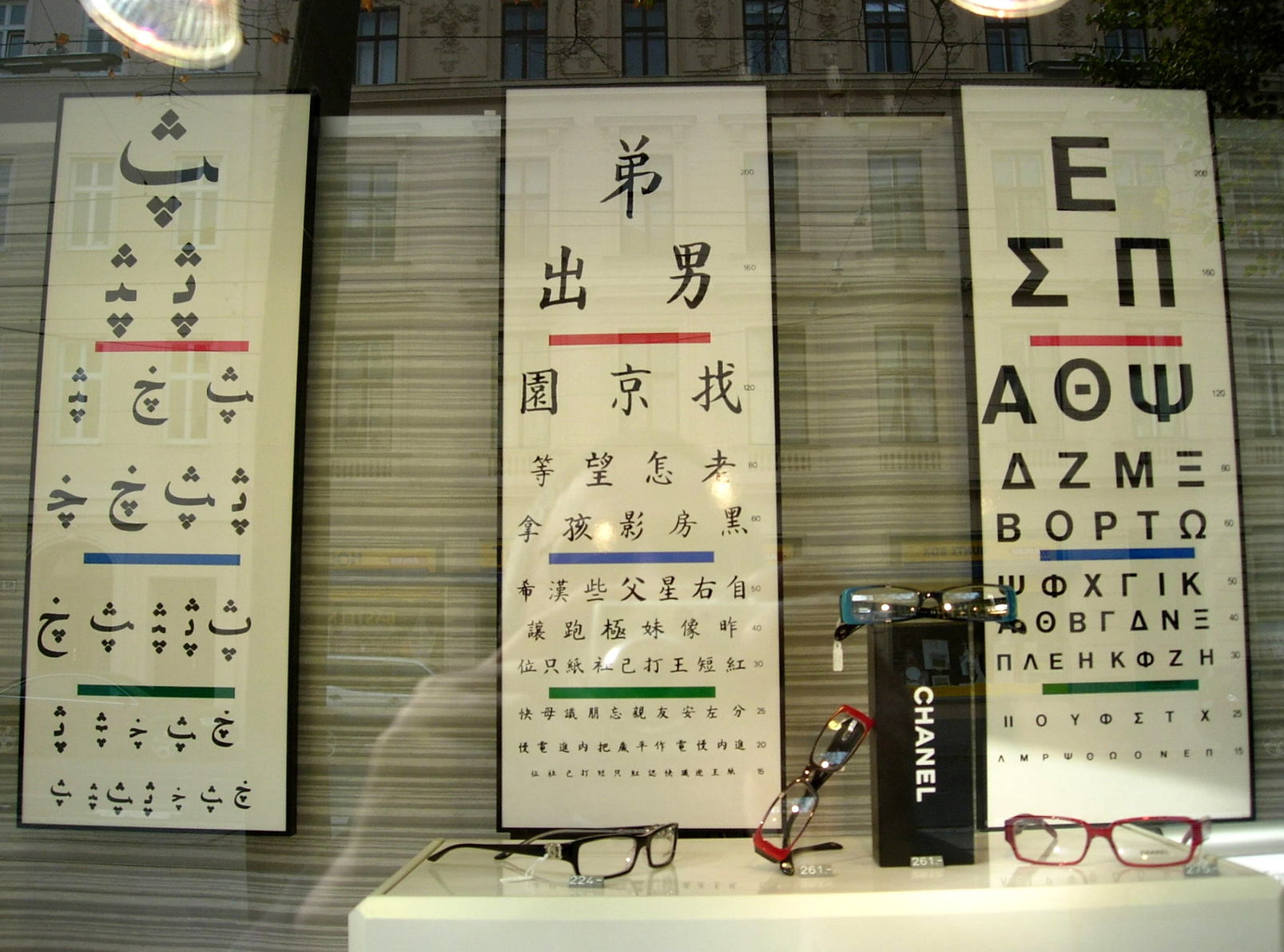 Bécs 062